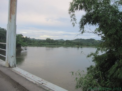 le fleuve Bemarivo, vue de la RN5a